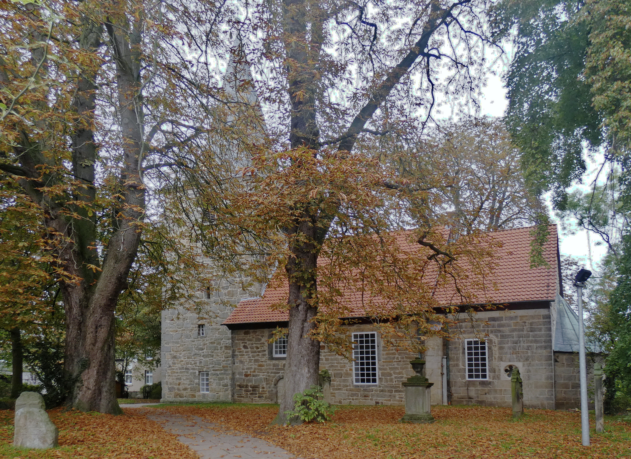 Ein denkmalgeschütztes Kirchengebäude in Hiddestorf, Stadt Hemmingen, Niedersachsen. Südseite mit Kirchhof.